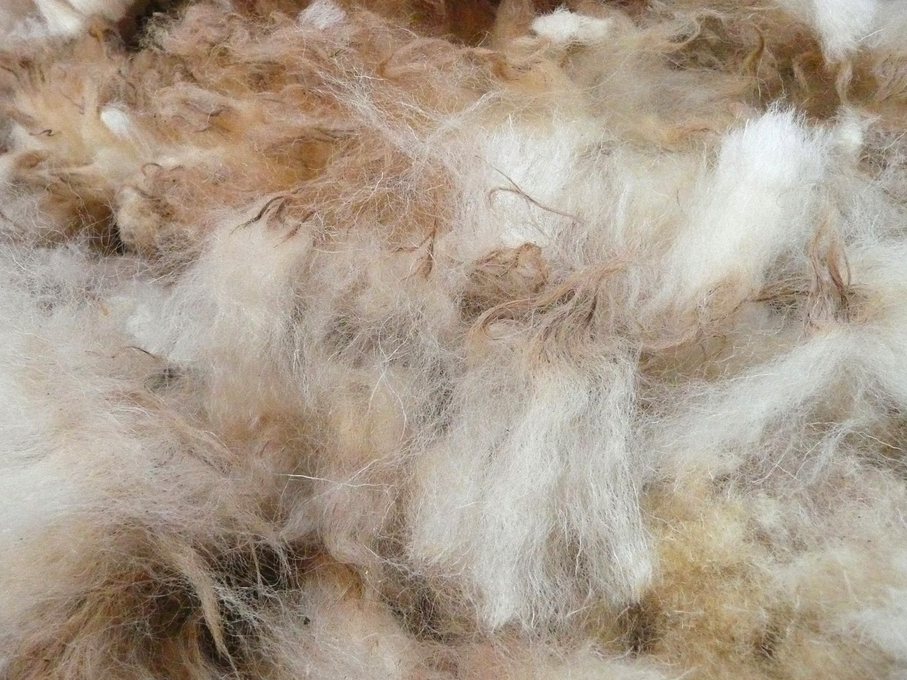 unbehandelte Wolle des Waldschafs, unmittelbar nach der Schur